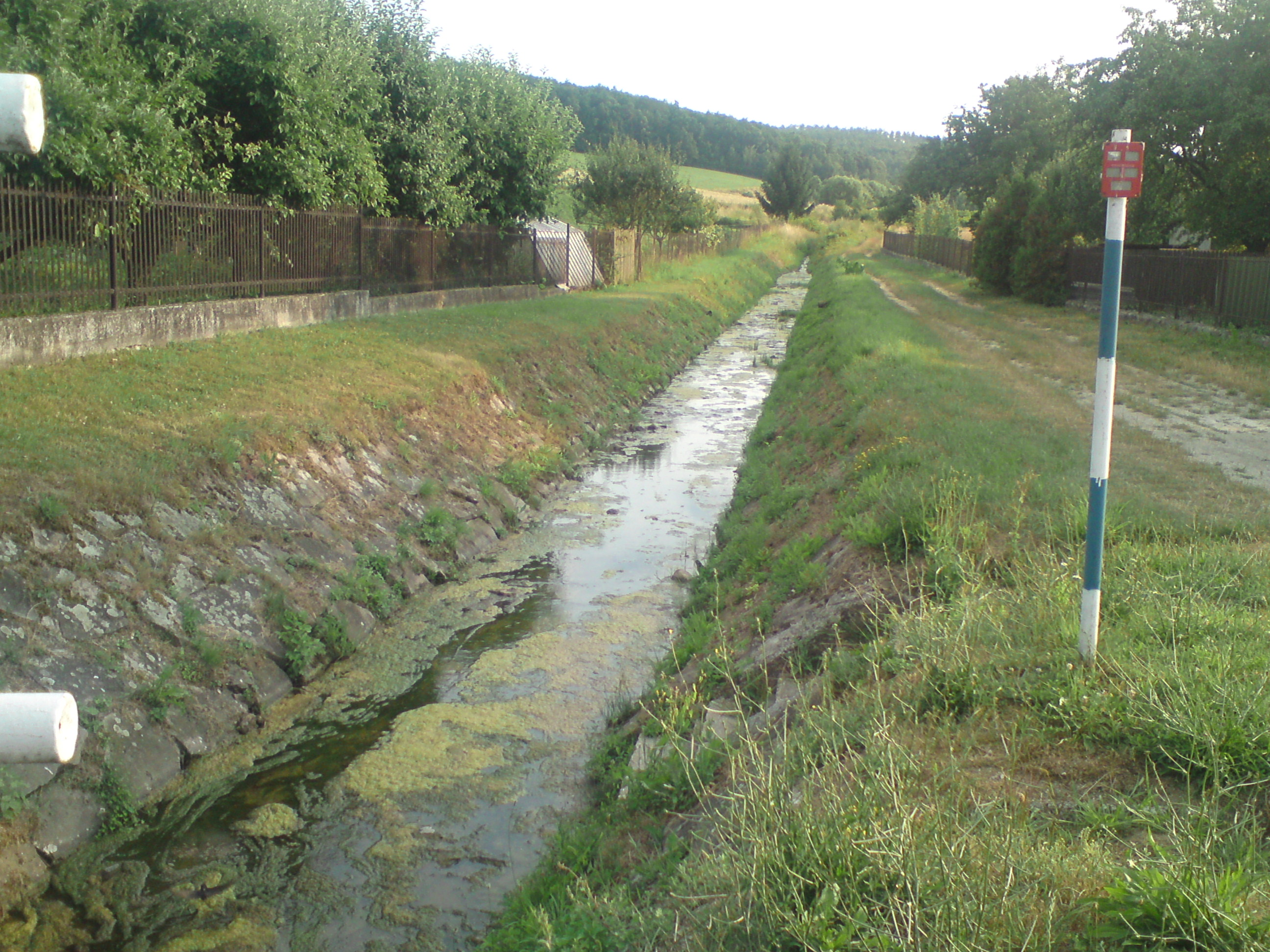 Vracovský potok v Kolačne